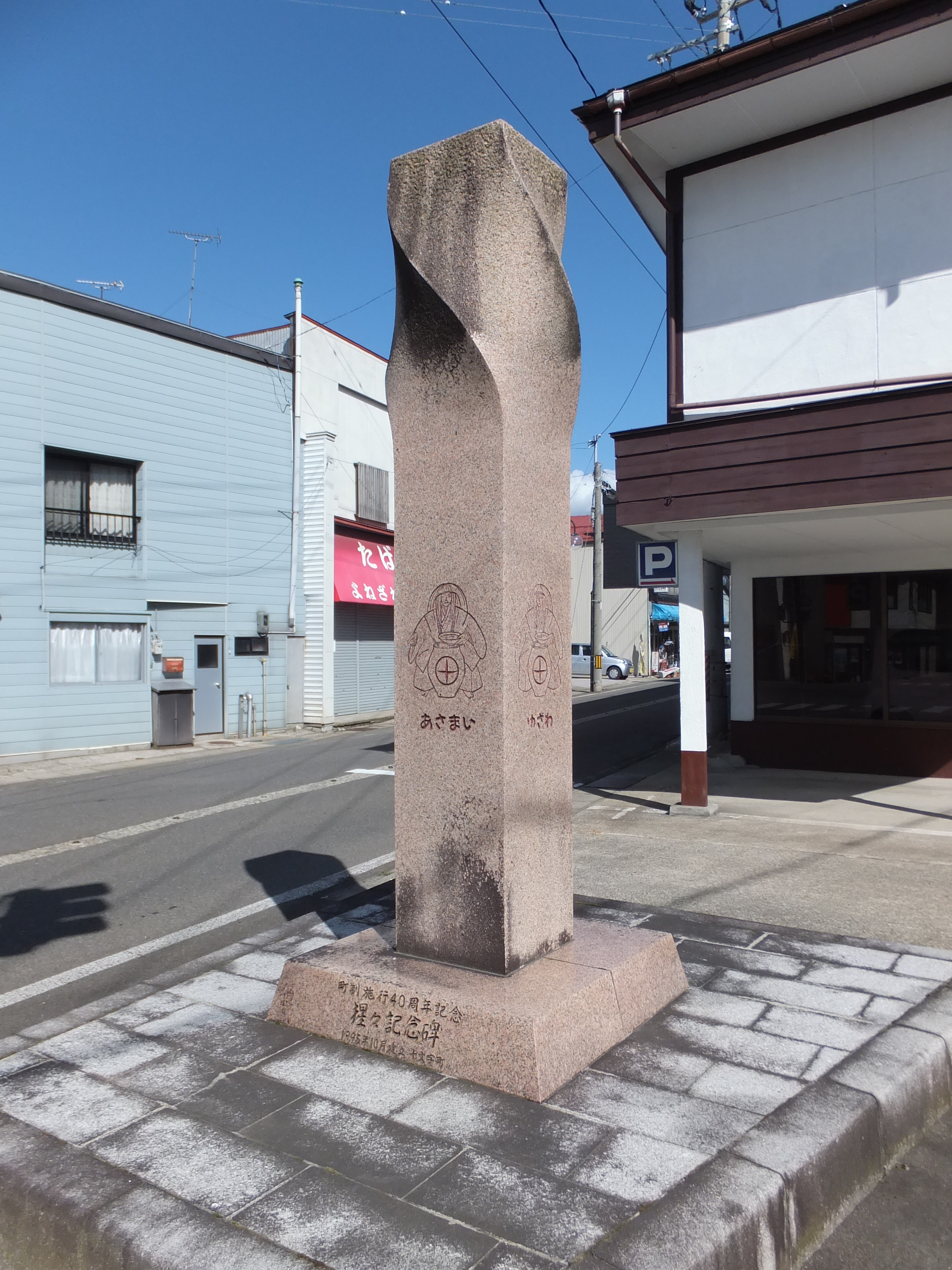 秋田県横手市、十文字駅前にある猩々記念碑。北面が横手、東面が増田、南面が湯沢、西面が浅舞と記されている。十文字町制施行40周年を記念して1995年に建立された。